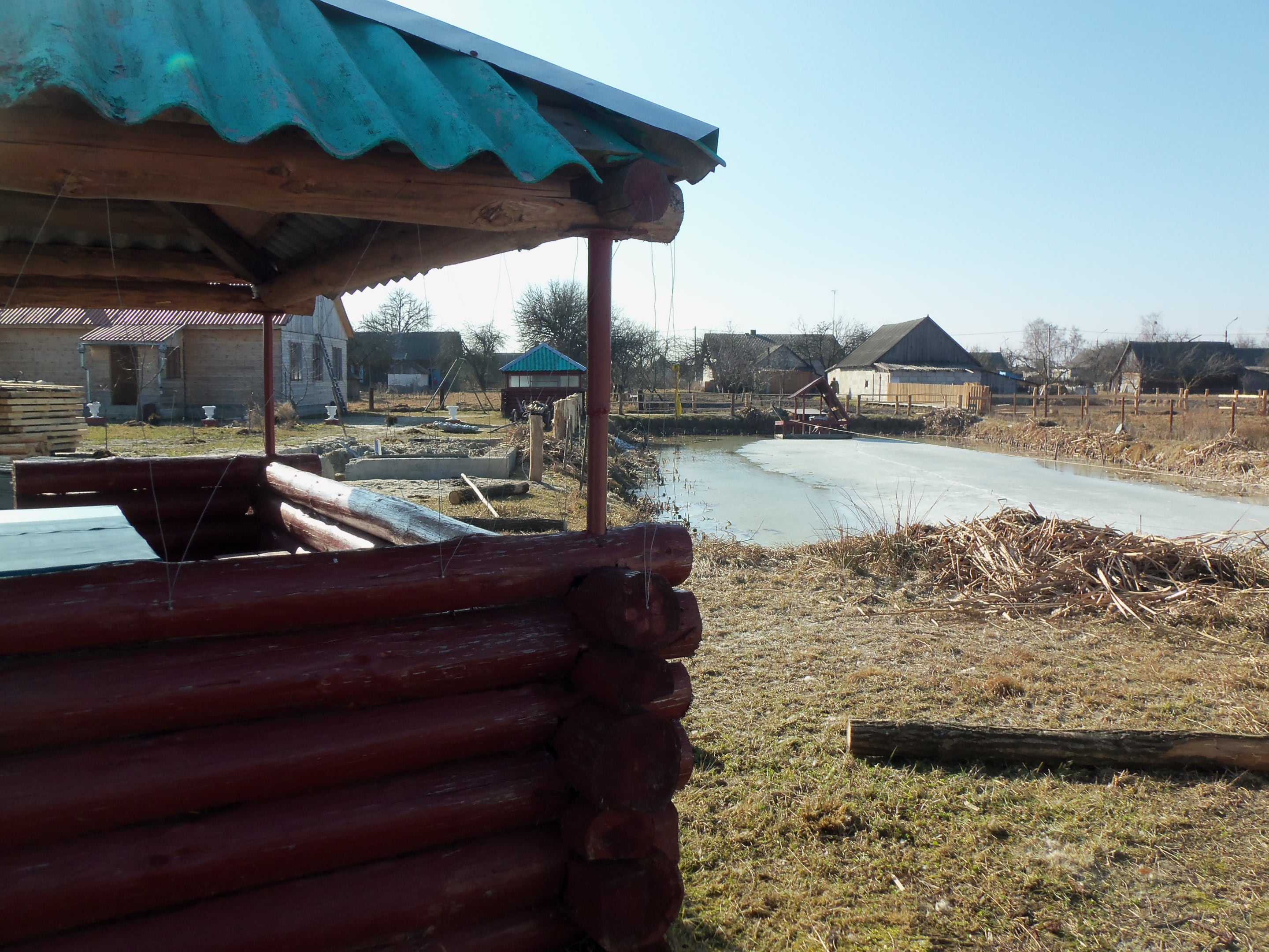 Jaječkavičy, Belarus